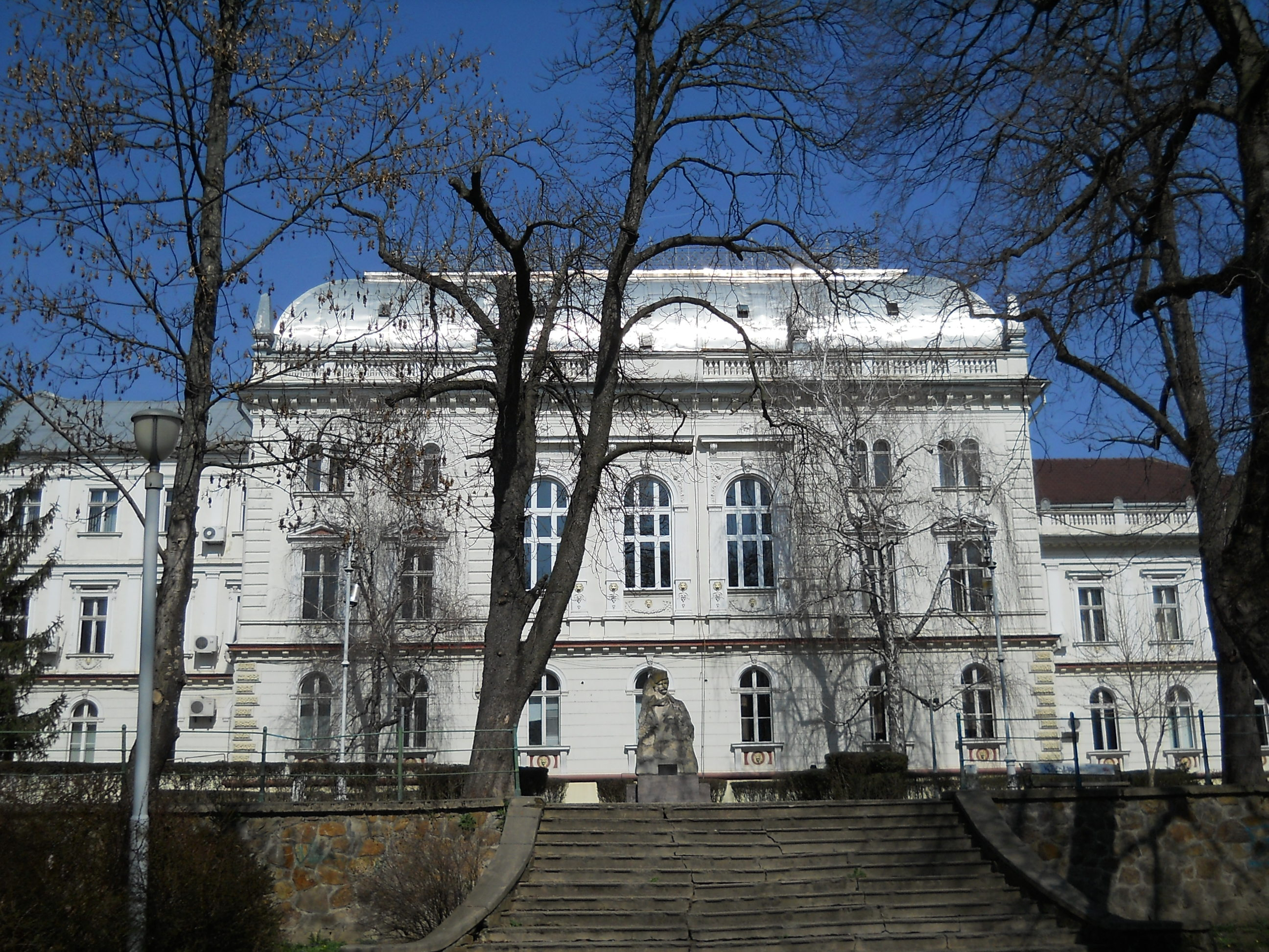 Vedere asupra laturii dinspre parcul Eminescu.